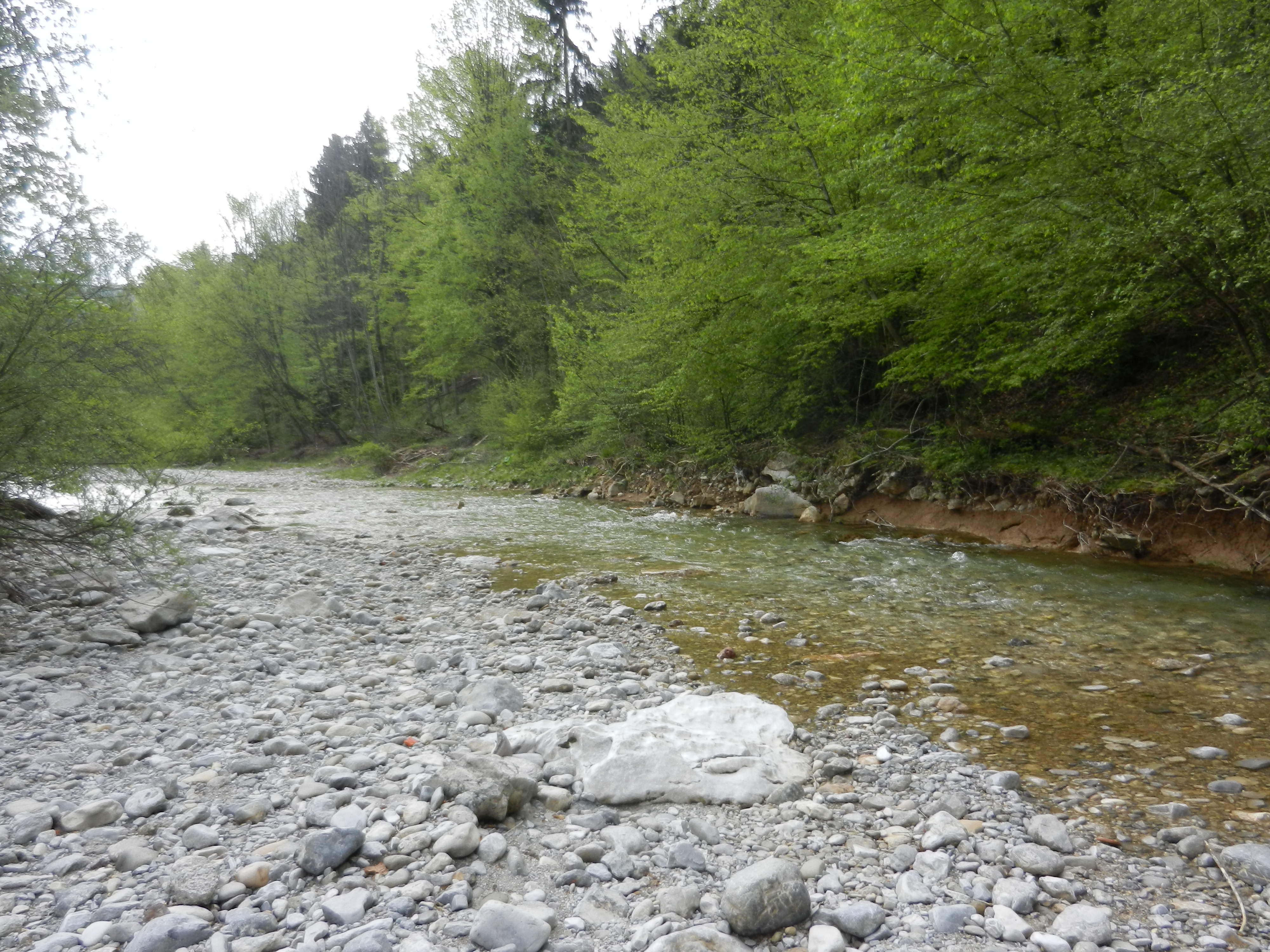 Naravna struga Iške v bližini Iške vasi.